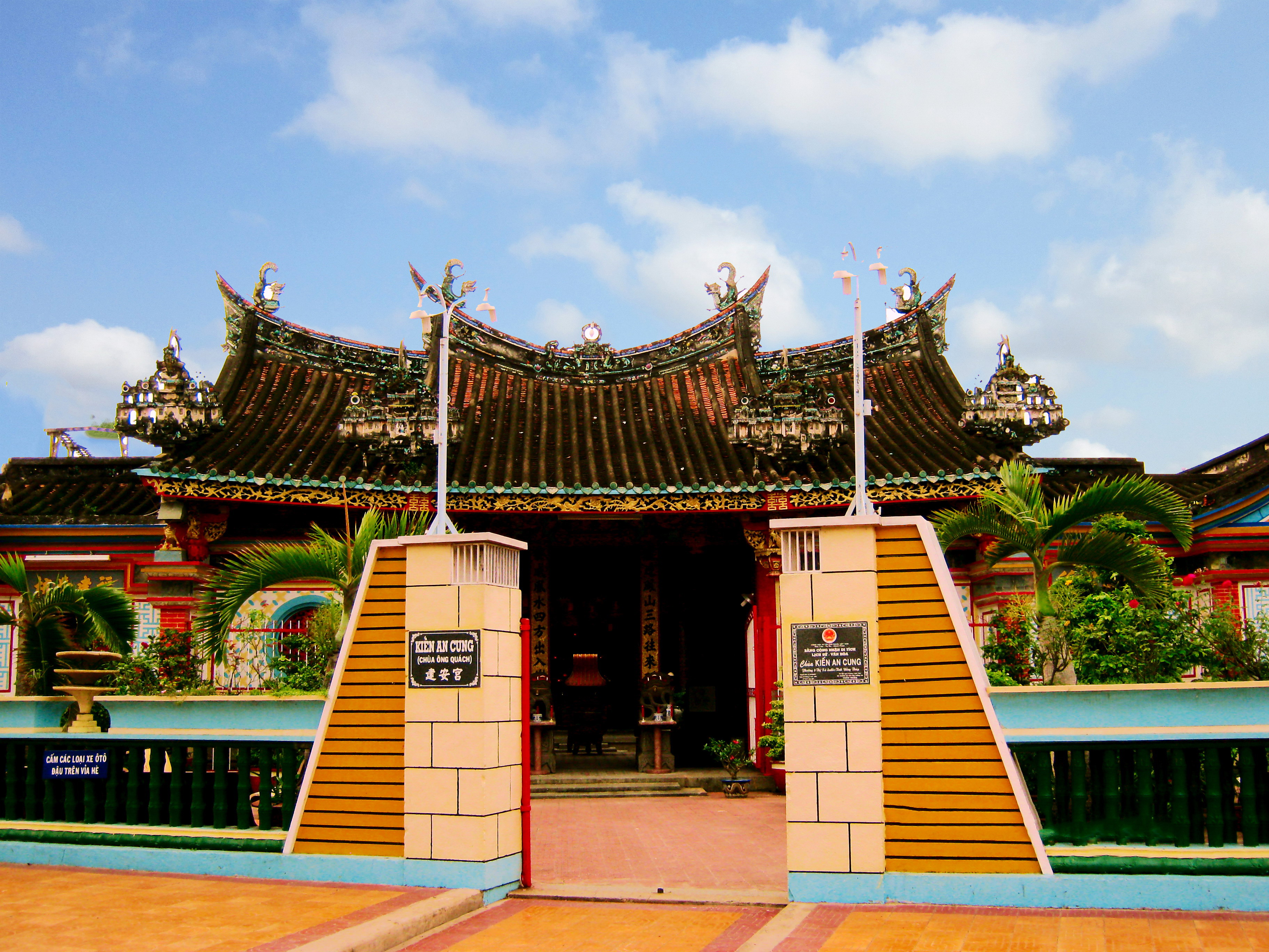 Kiến An Cung, tục gọi là chùa ông Quách, tọa lạc tại trung tâm thành phố Sa Đéc, tỉnh Đồng Tháp, Việt Nam. Đền được xây từ năm 1924 đến năm 1927 bởi những người Hoa đến từ Phúc Kiến (Trung Quốc).